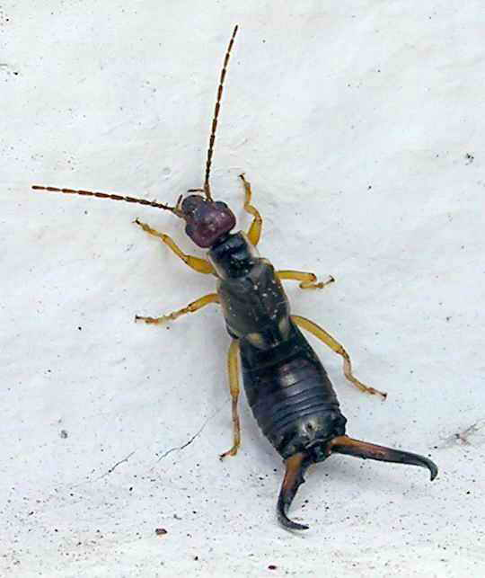 Foto tirada cunha Nikon E8800 en Bastabales.